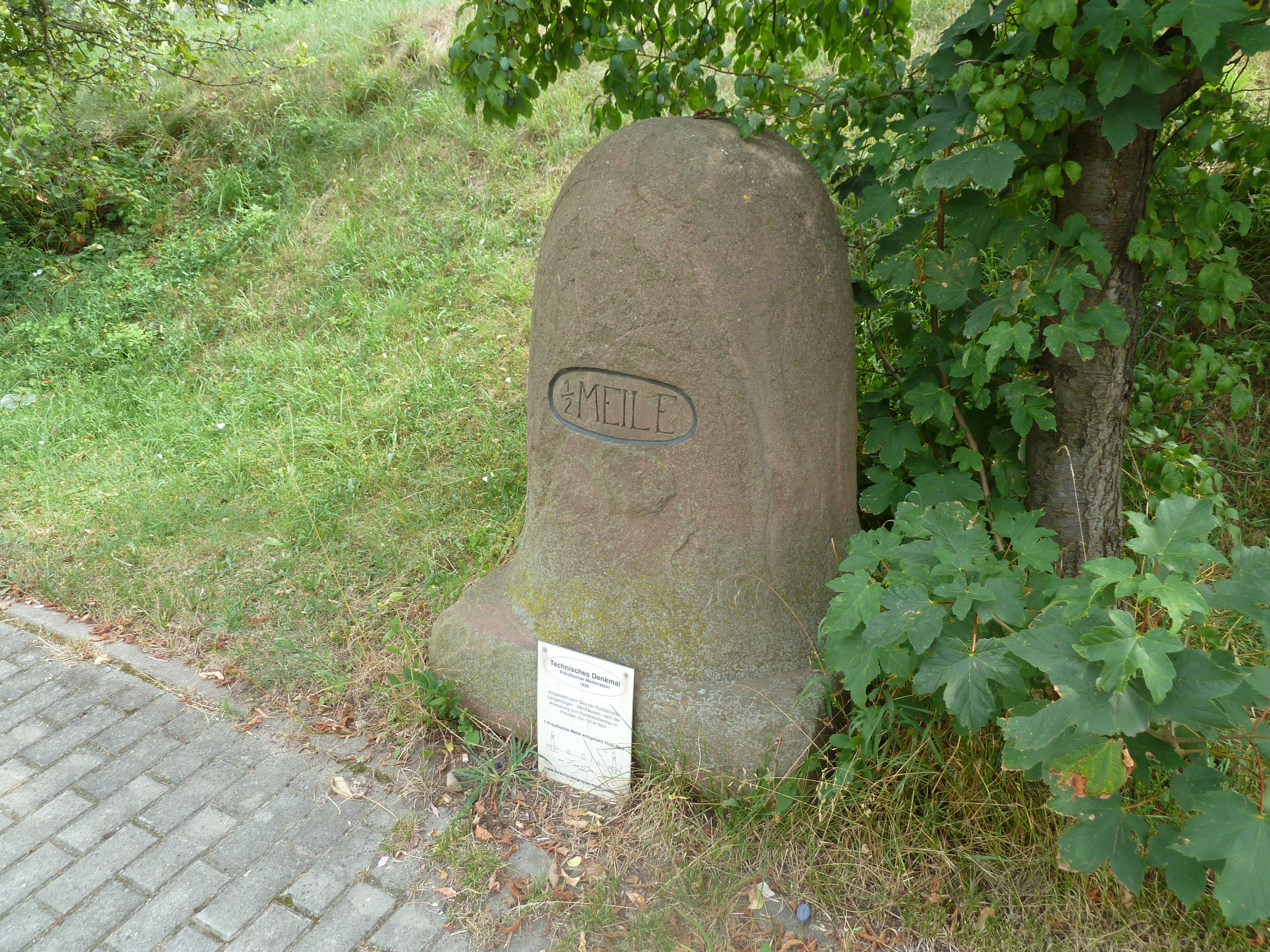 Blankenheim, Halbmeilenstein an der Hauptstraße, technisches Denkmal